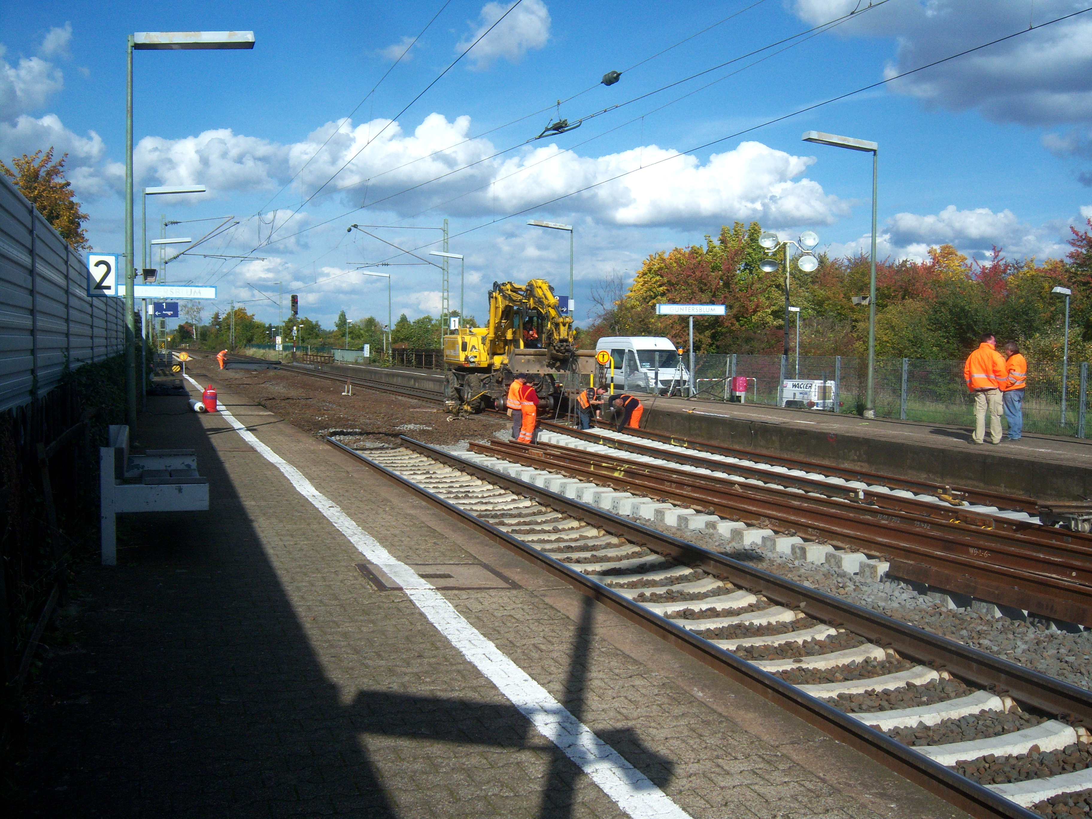 Einbau einer Weiche im Bahnhof Guntersblum auf der Bahnstrecke Mainz–Ludwigshafen während einer Serienbaustelle